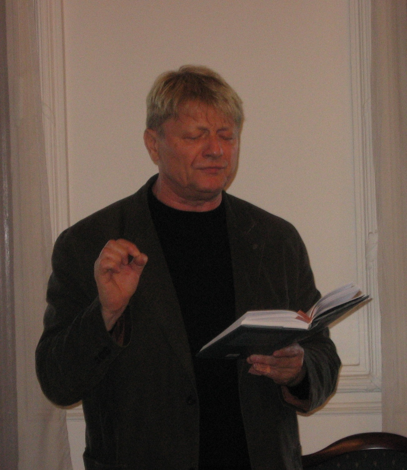 Hegedűs D. Géza (eredetileg Hegedűs Géza, Ibrány, 1953. május 7. –) Kossuth- és Jászai Mari-díjas magyar színész, rendező, egyetemi docens, a Színház- és Filmművészeti Egyetem rektorhelyettese, a MASZK Országos Színészegyesület elnöke, továbbá a Magyar Színházi Társaság elnökségének és a Nemzeti Előadó-művészeti Érdekegyeztető Tanácsnak (NEÉT) tagja, a Halhatatlanok Társulatának örökös tagja, érdemes és kiváló művész, a Vígszínház volt MSZMP-titkára